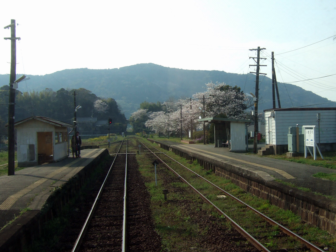 松浦鉄道今福駅（Matsuura Railway Imabuku Station）